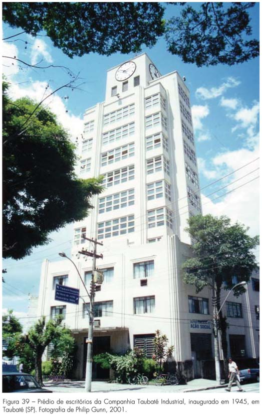 Prédio do Relógio Companhia Taubaté Industrial